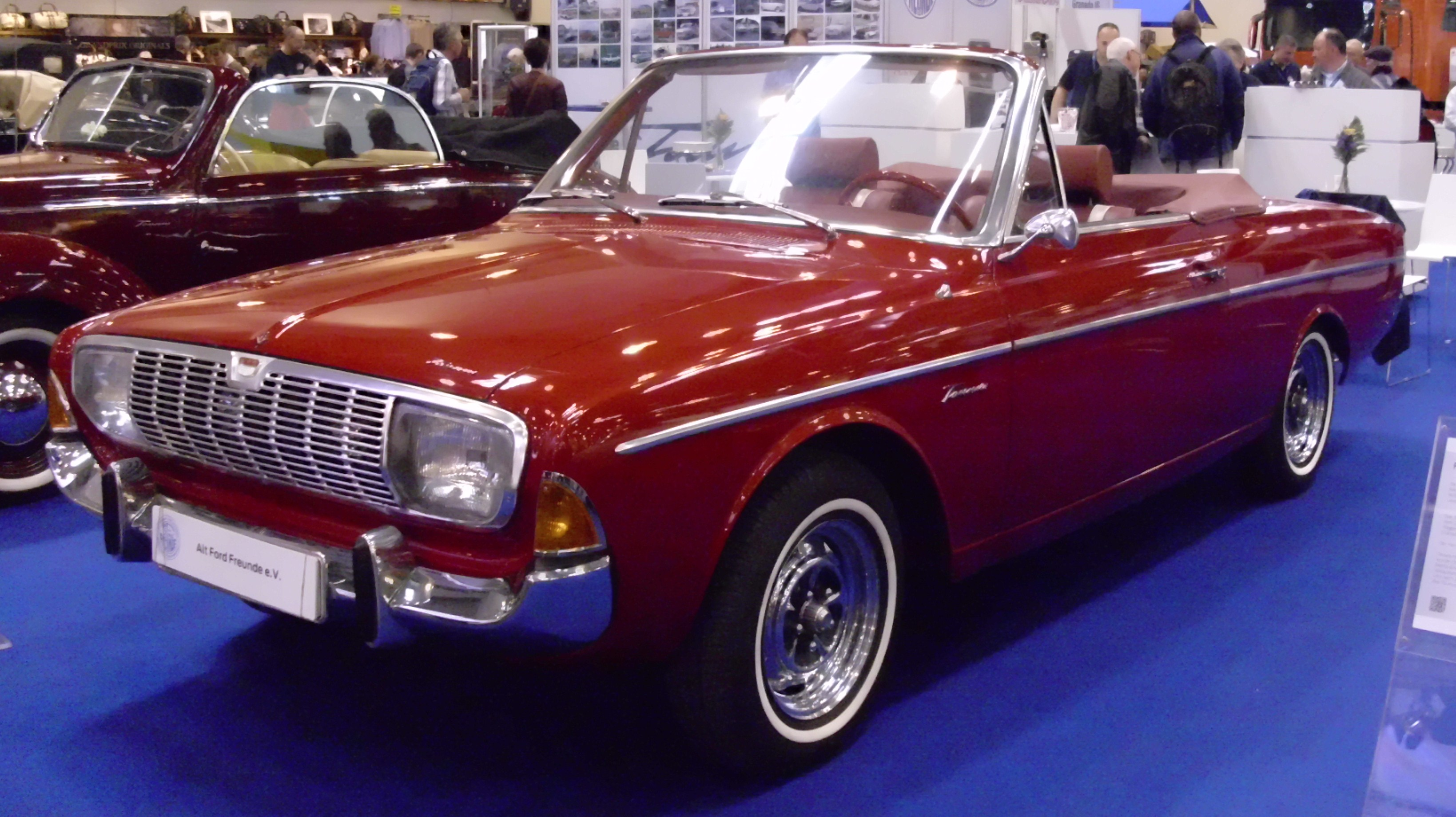 Ford 20 M P 5 Cabriolet von Deutsch 1965